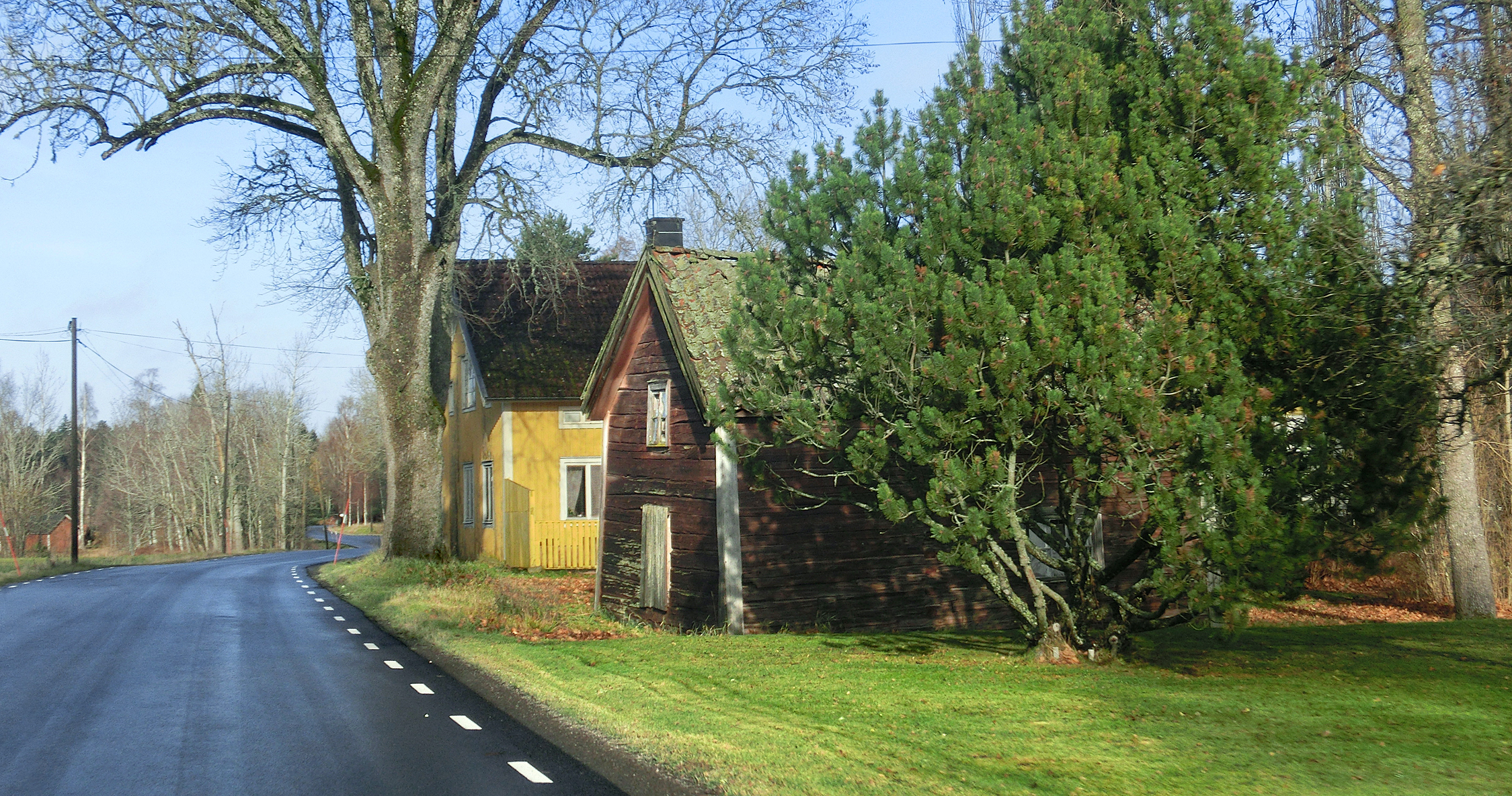 Gammalt, timrat uthus intill Länsväg 200 i Björkulla by, Älgarås socken, Töreboda kommun, Vadsbo härad, f.d. Skaraborgs län, Västergötland, Västra Götalands län, Sverige. Uthuset skyms delvis av en buskartad tall till höger i bild (troligen en bergtall, Pinus mugo). Bakom uthuset finns ett gulmålat boningshus. Fotot är taget åt norr från Björkulla busshållplats. Länsväg 200 ses till vänster på fotot.